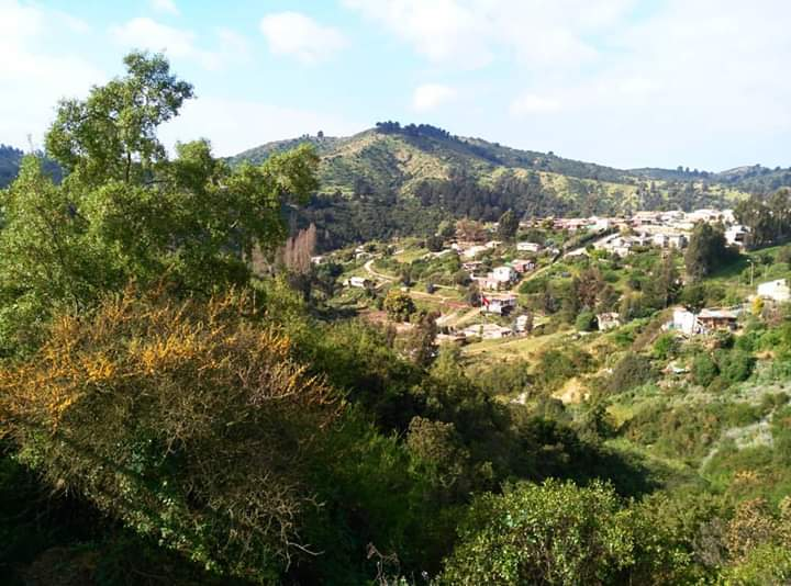 Vista de Reñaca Alto desde paradero 9